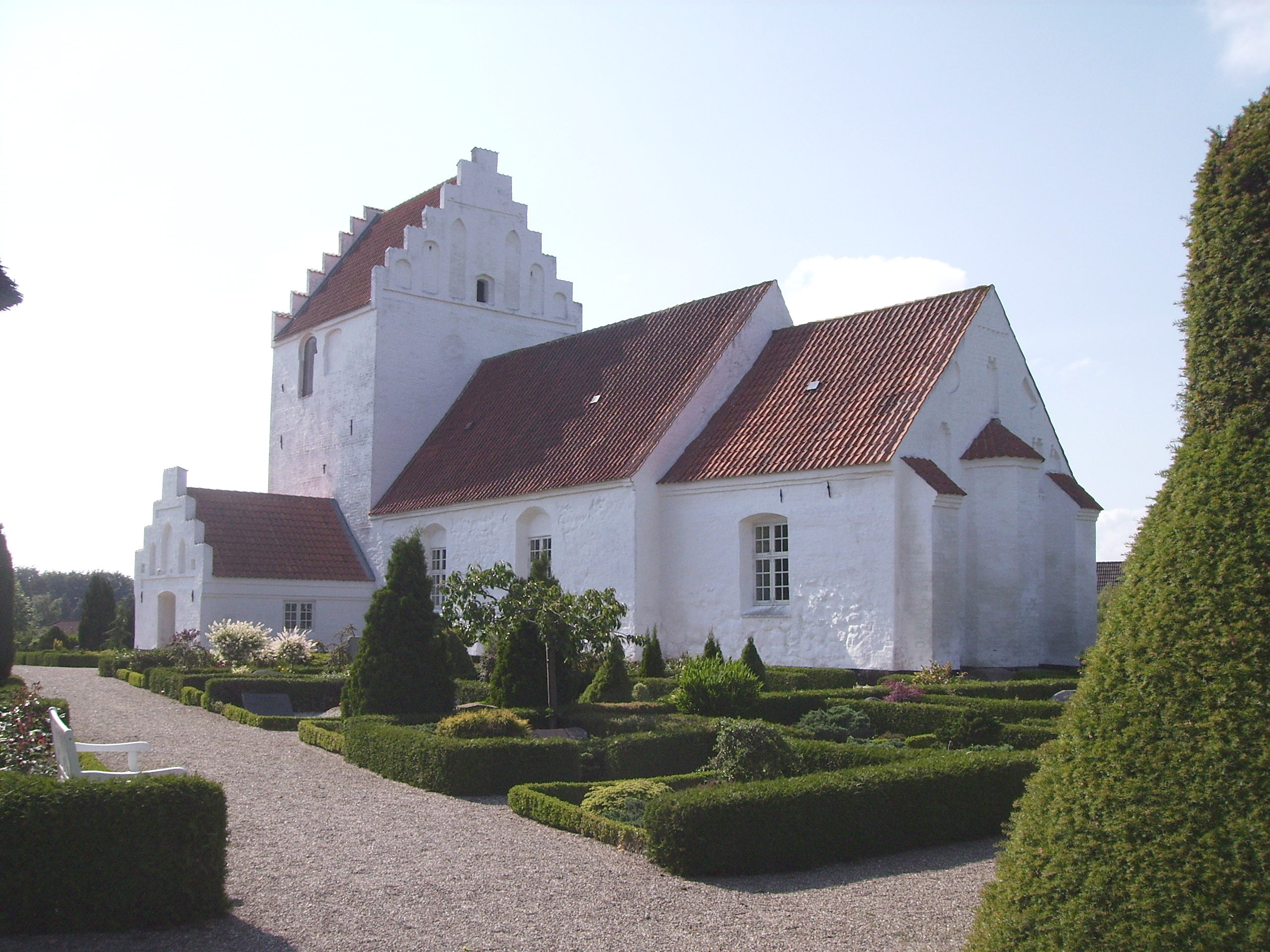 Fangel Kirke, Fangel Sogn, Odense Herred, Odense Amt, Denmark (Danish Church)